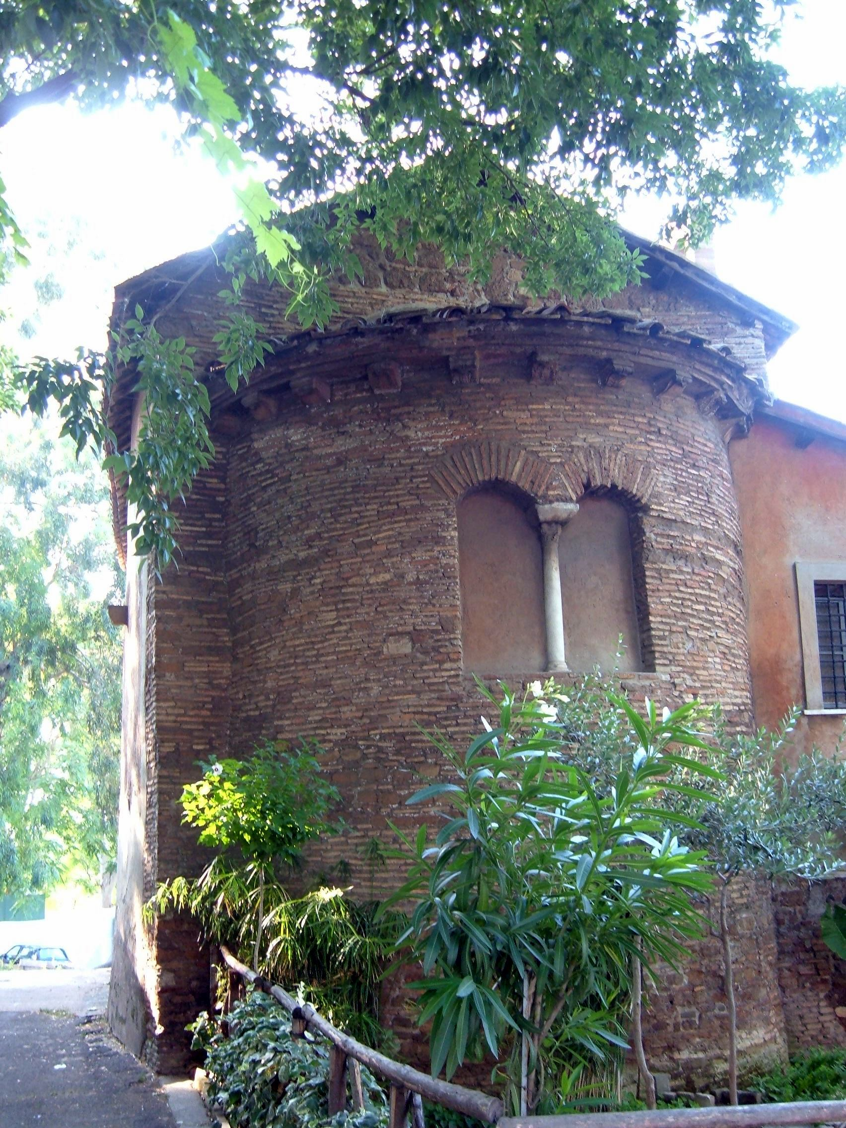 Chiesa di Santa Passera, a Roma, nel quartiere Portuense.